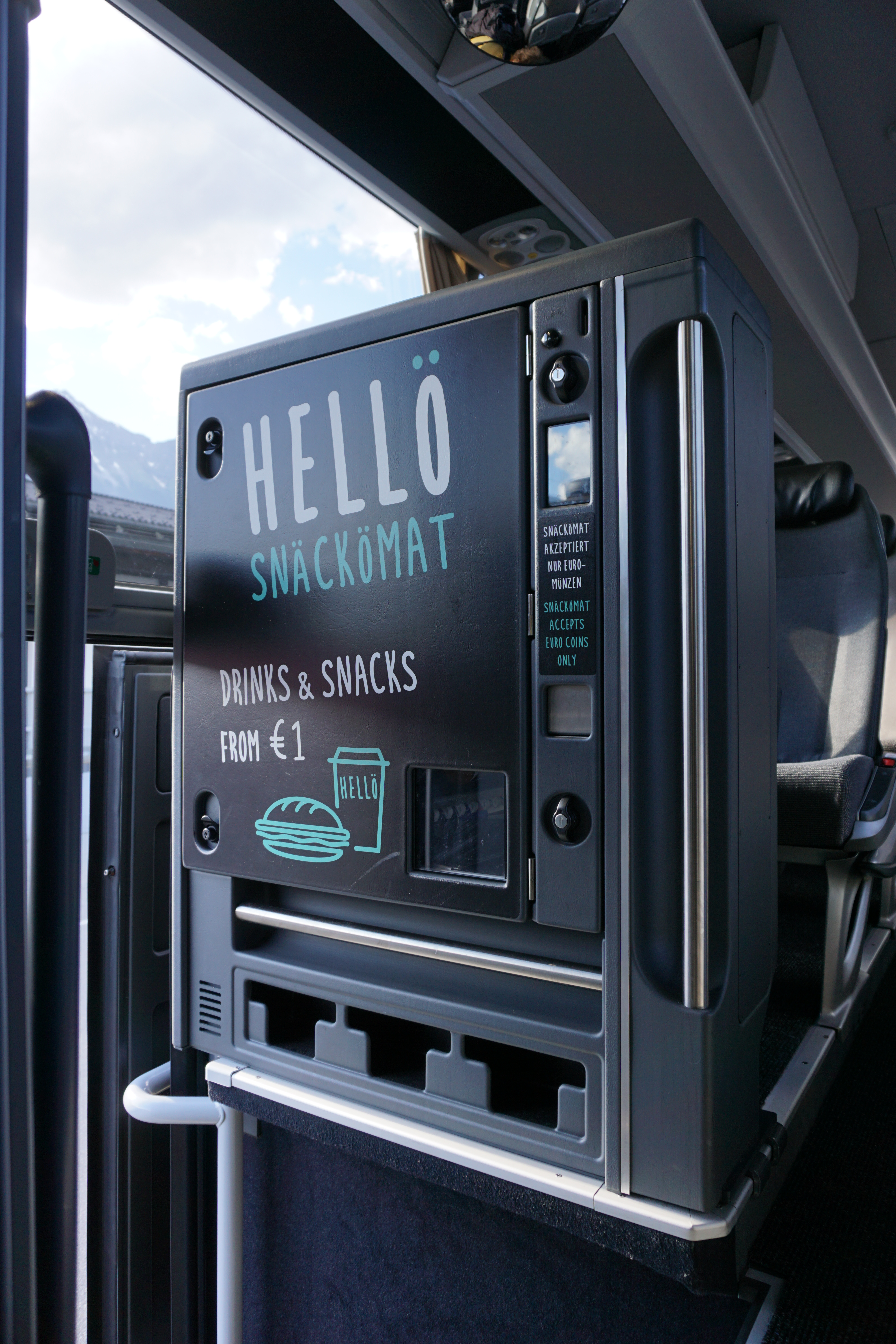 Snackautomat im HELLÖ Mercedes-Benz Tourismo 17 RHD